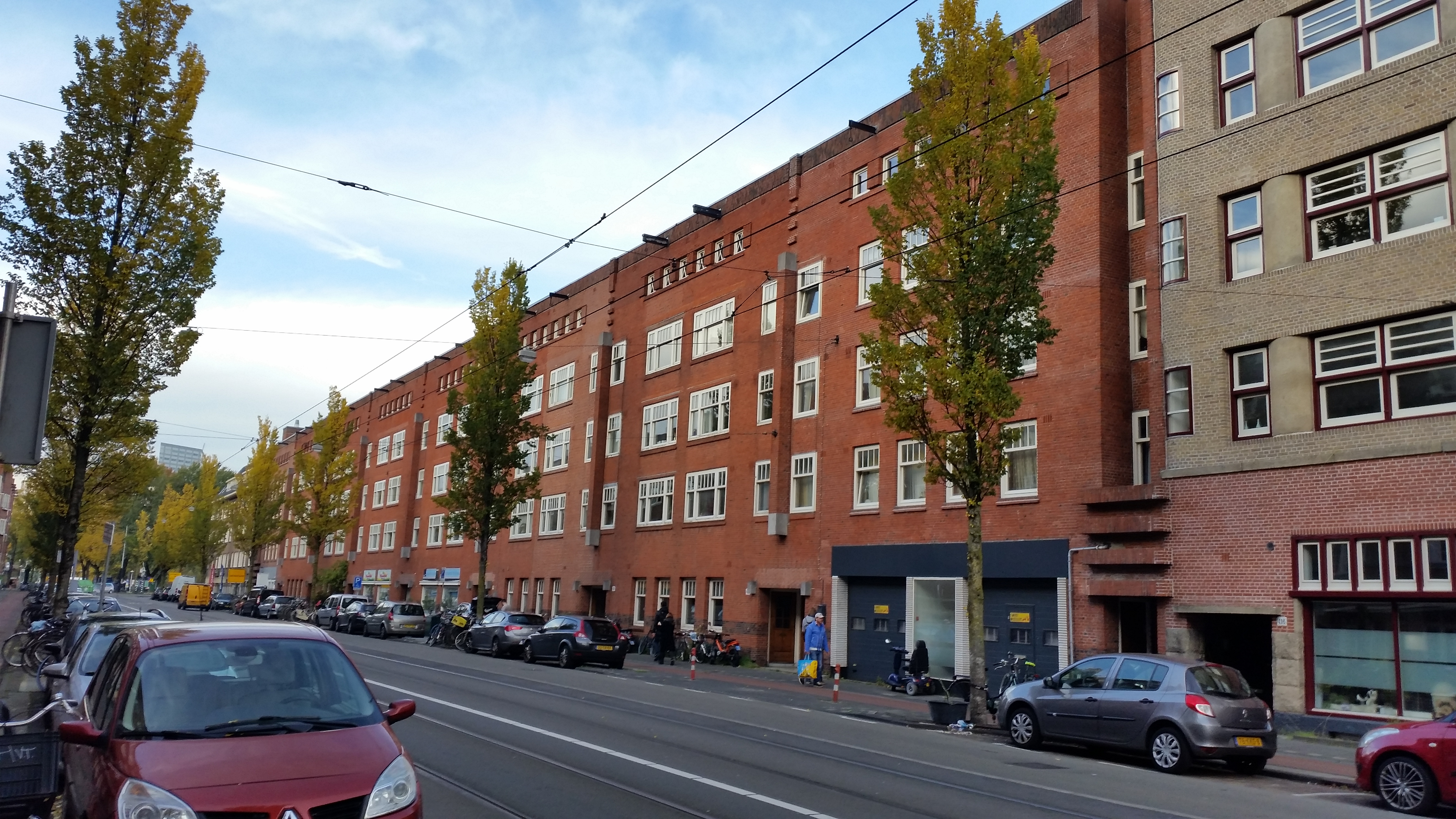 Het rode blok van Roodenburgh, huisnummers 418 en hoger